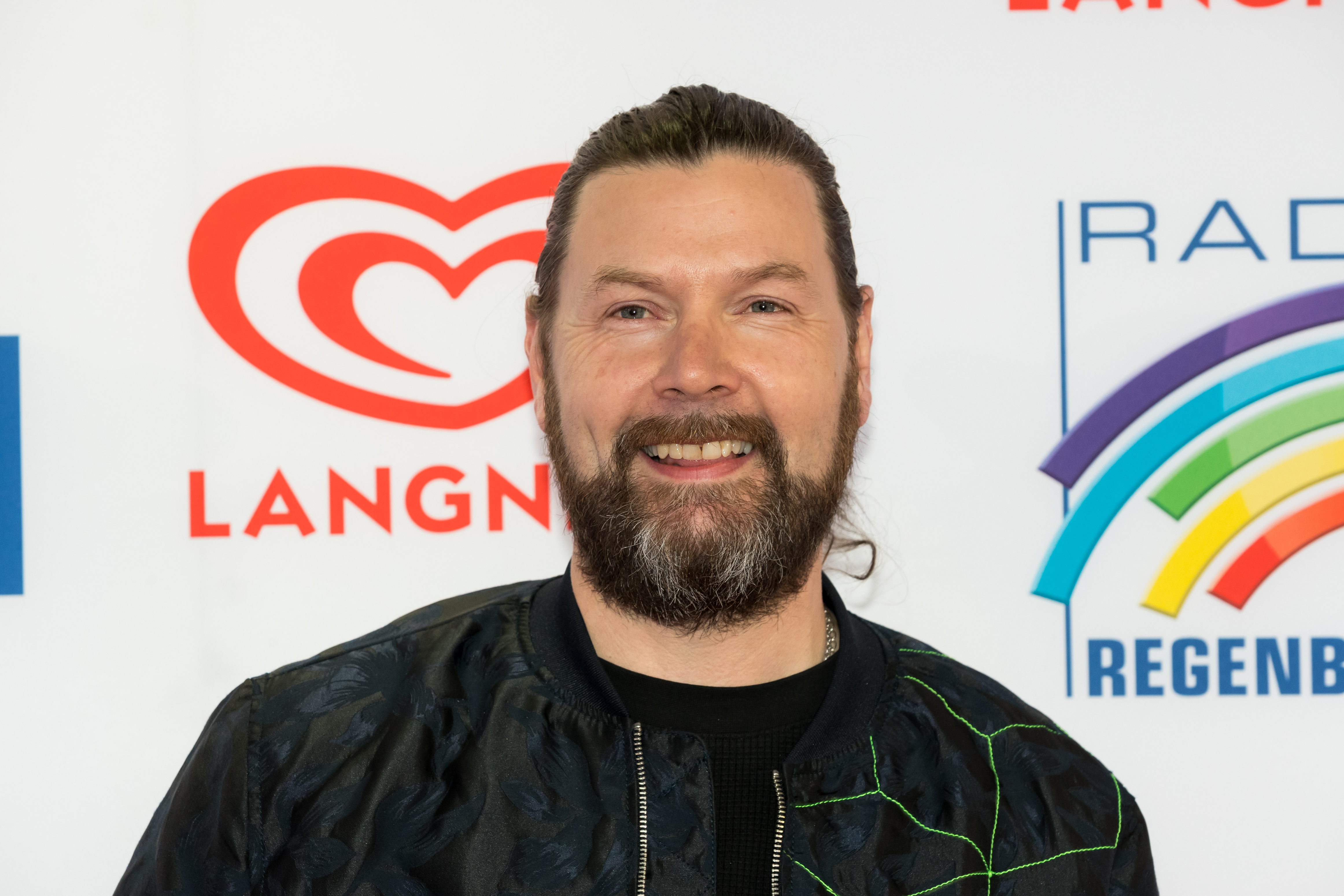 Rea Garvey during Radio Regenbogen Award 2019 at Europapark, Rust, Baden-Württemberg, Germany on 2019-04-12, Photo: Sven Mandel